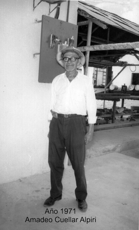 Ex trabajador de la Standar Oil Company, mi abuelo trabajó hasta sus 72 años en YPFB. Murio seis años despues de sacada la foto